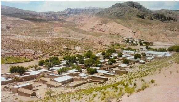 Vista de la localidad de San Antonio de Esmoruco, Provincia de Sud Lípez, Departamento de Potosí, Bolivia